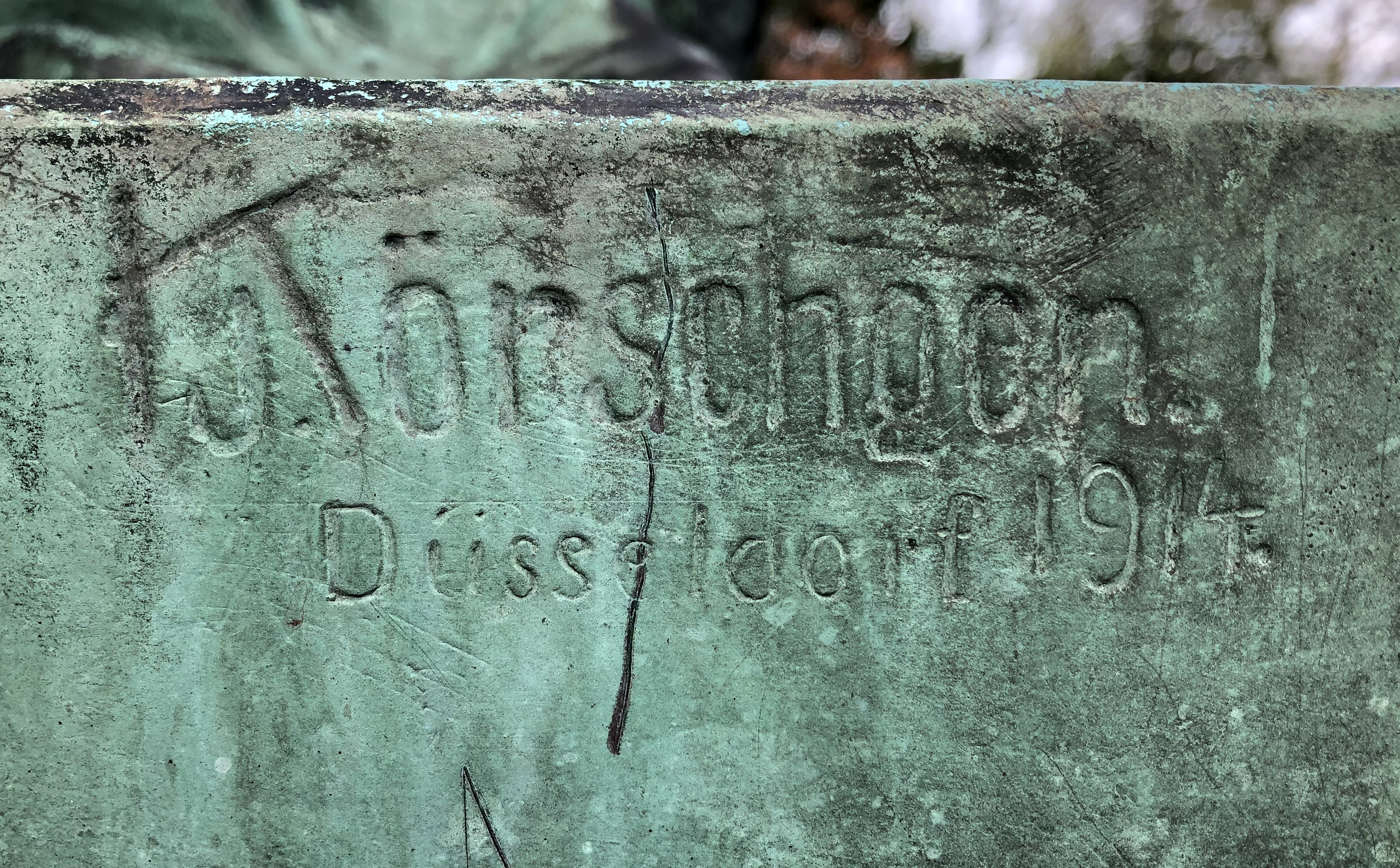 1914 Signatur des Bildhauers Josef Körschgen (1876–1937) am Skulpturensockel, Grabstätte Kröner, Nordfriedhof Düsseldorf